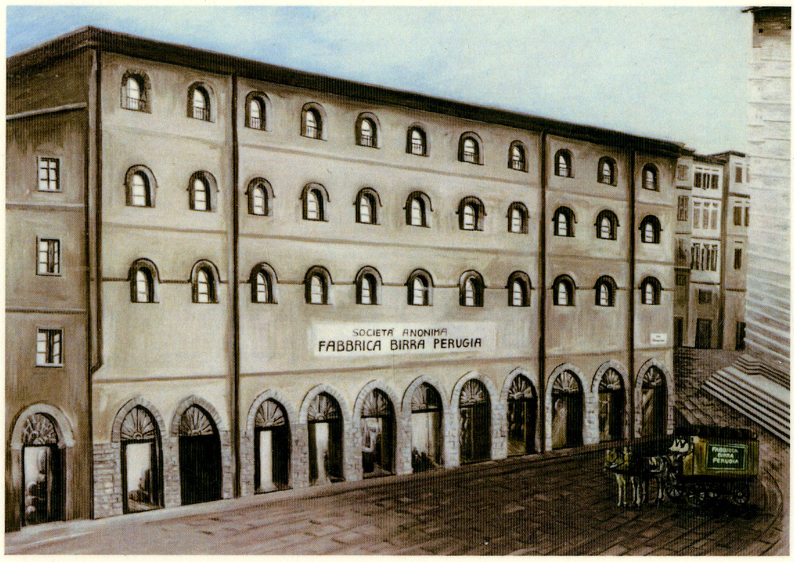 Seconda sede stabilimento